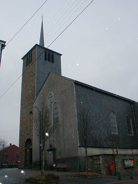 Walon: Eglijhe d' Ofagne, la k' i nivtêye e moes d' måss